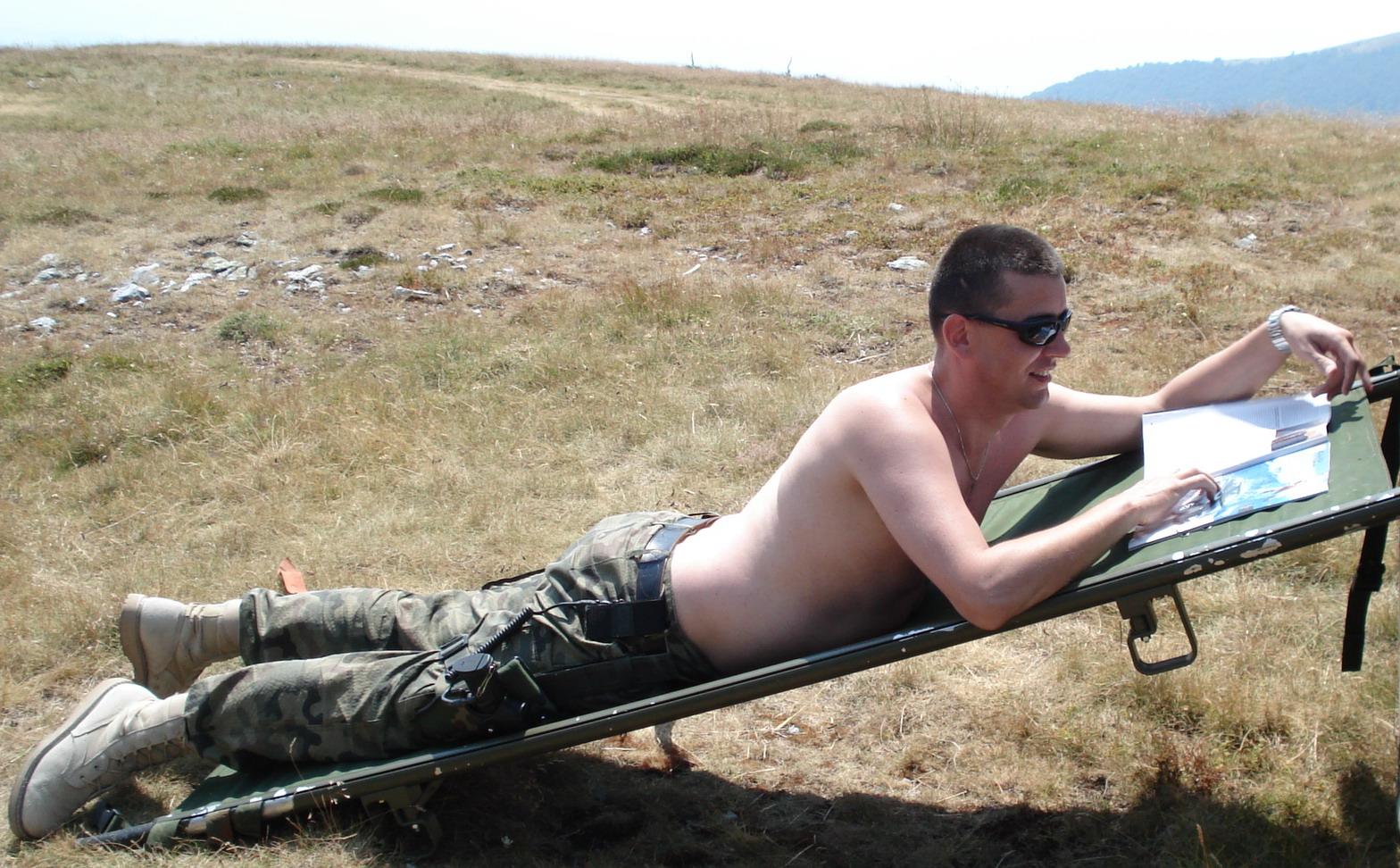 Sunbathing